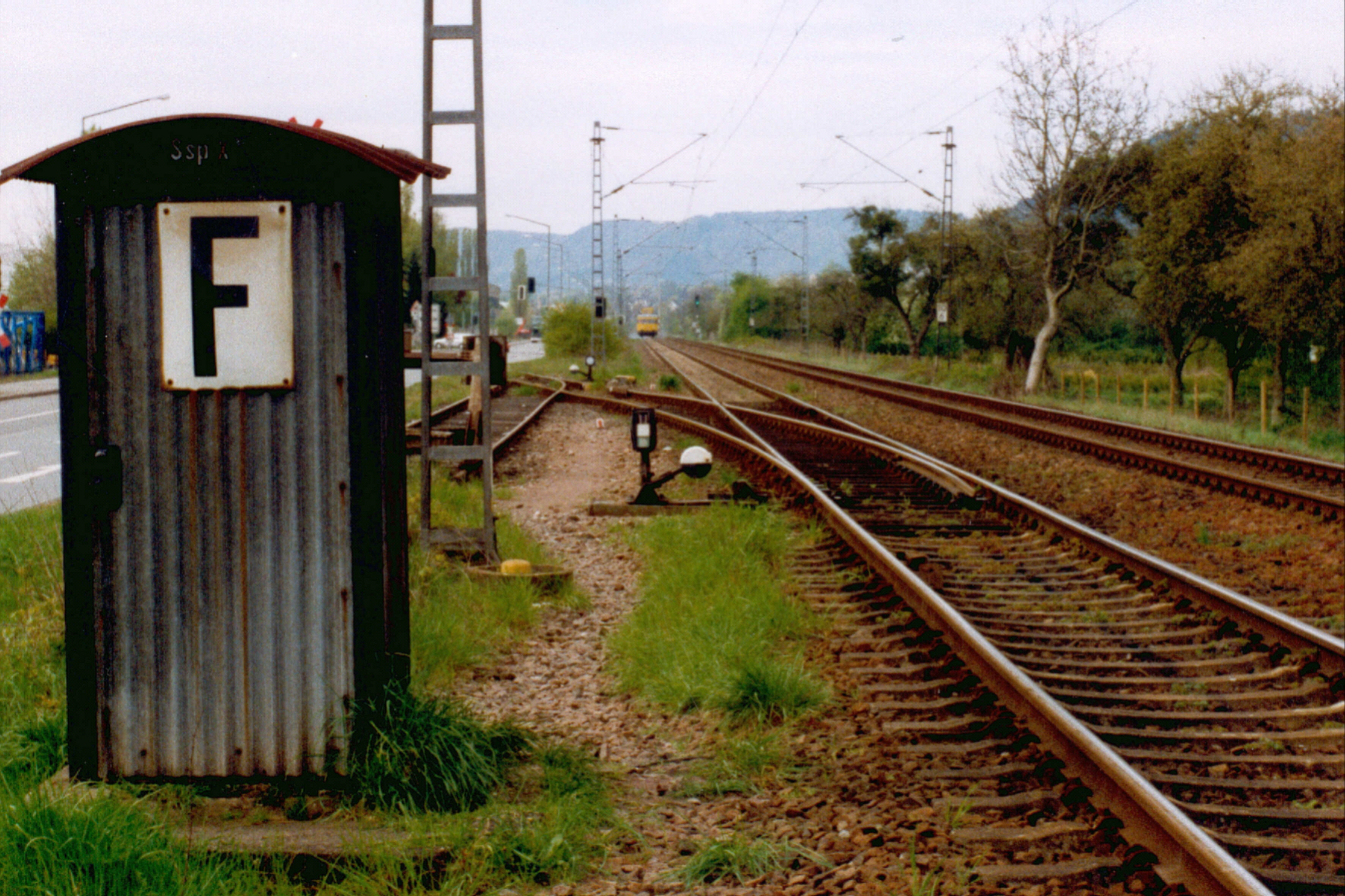 Anschlussweiche einer Ausweichanschlussstelle. Das Foto entstand zwischen Trier und Zewen auf der Westtrasse